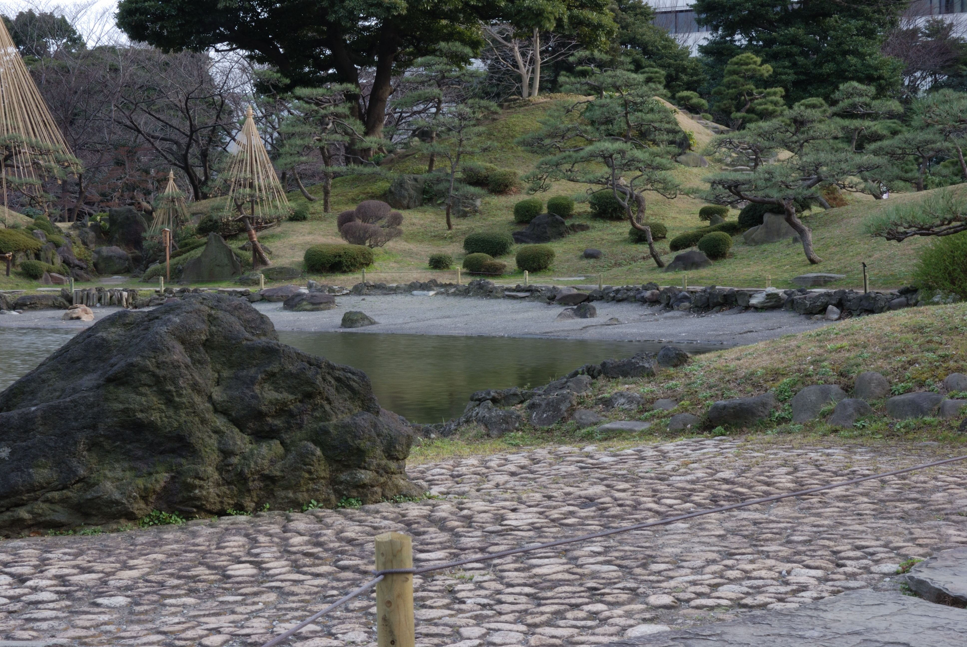 Oyama